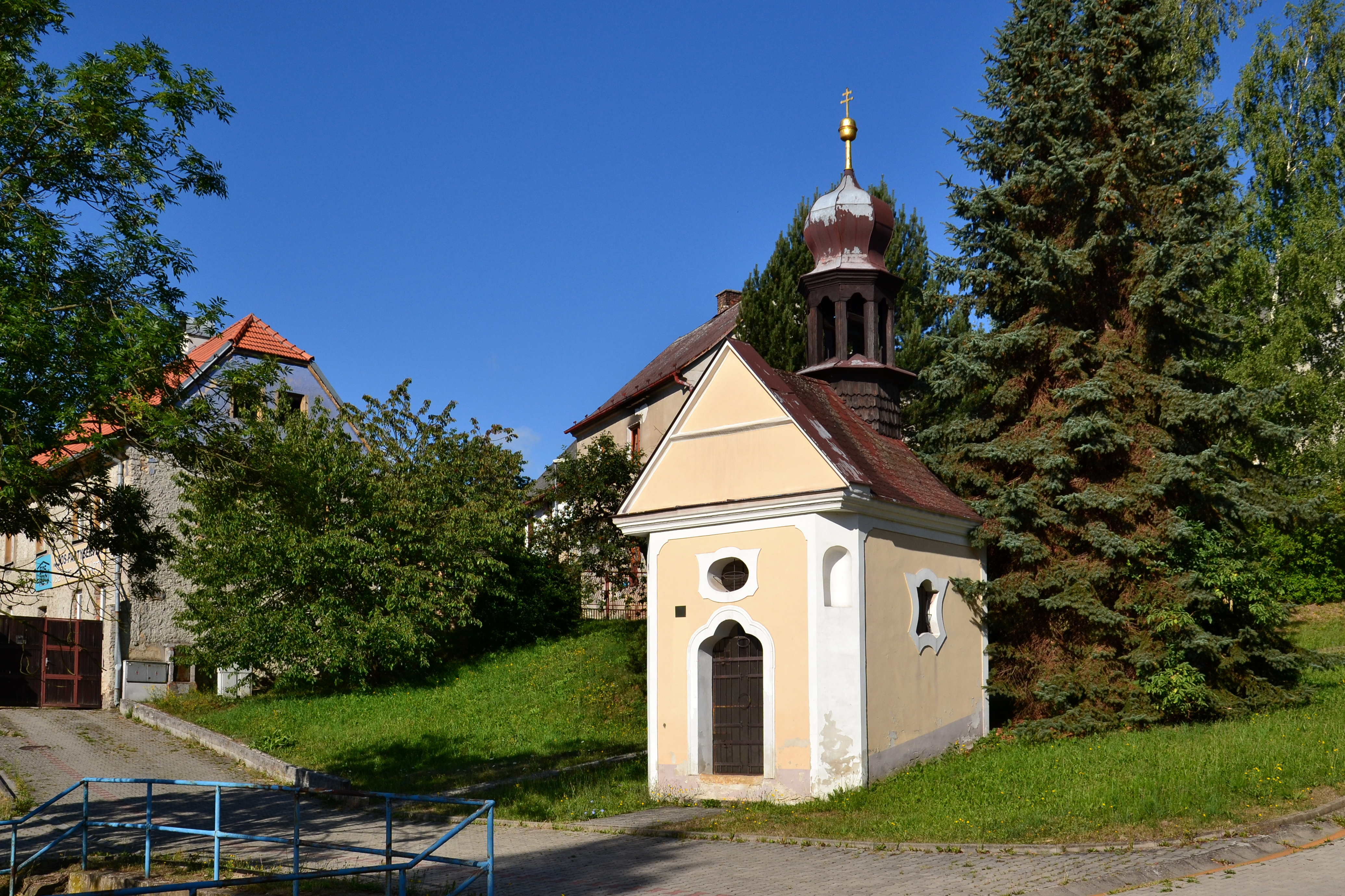 Kaple Panny Marie Pomocné, Vinařice (Jirkov).